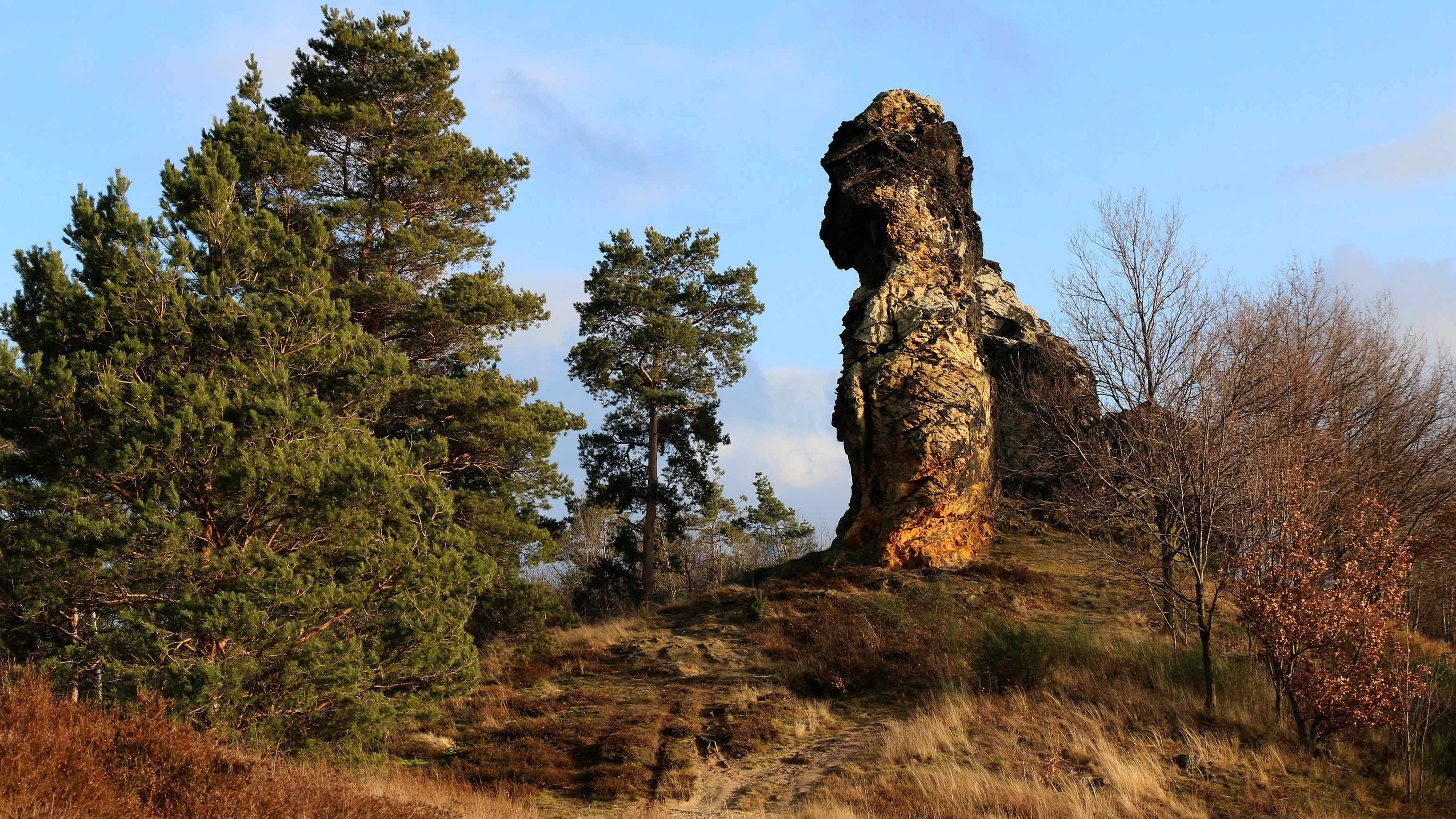 Diese Felsformation heißt Königstein oder auch "Kamel", weil sie aus einer bestimmten Richtung so aussieht. Ort: Westerhausen